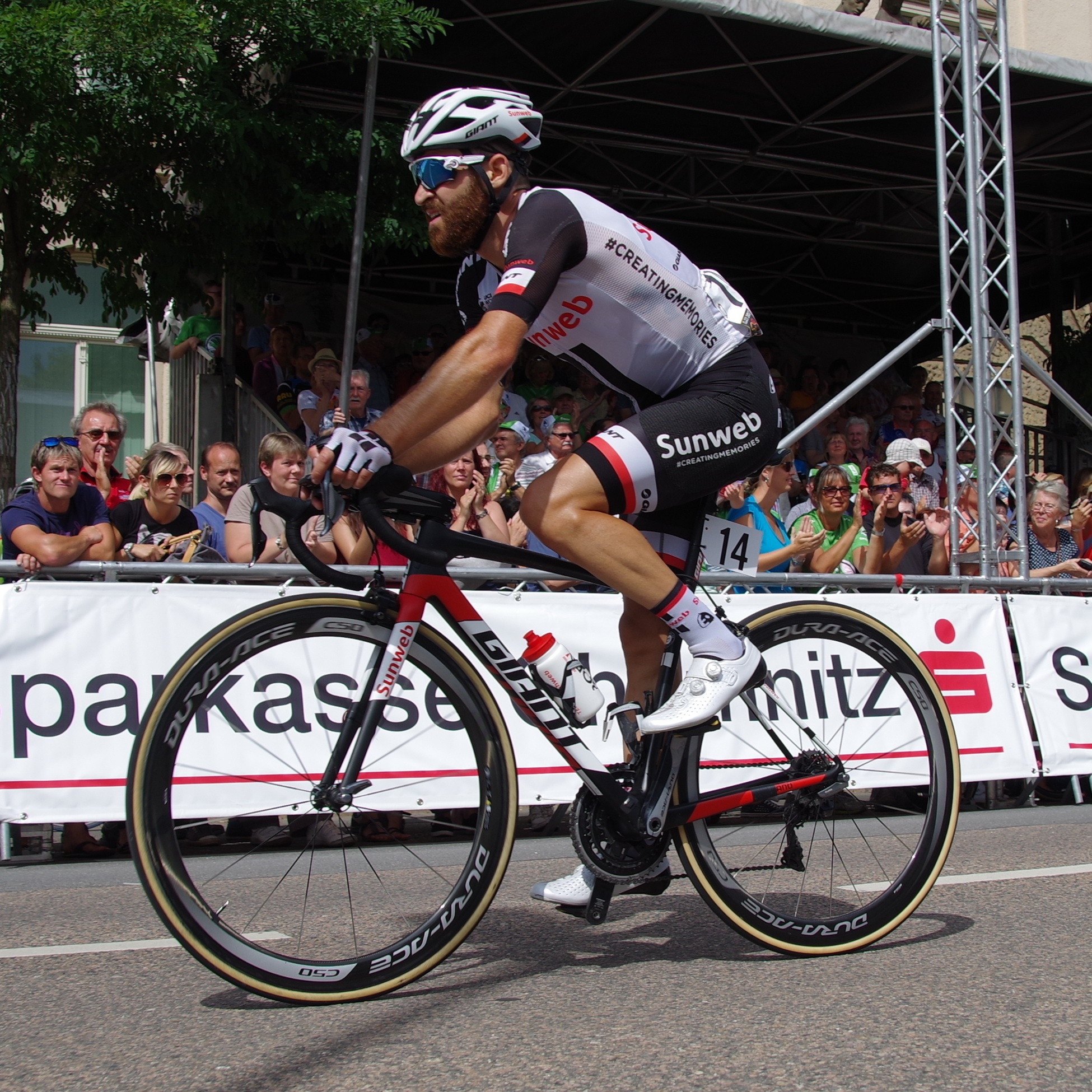 Deutsche Meisterschaften im Straßenrennen 2017 (Männer) 25. Juni 2017 Zieleinfahrt Simon Geschke The making of this document was supported by the Community-Budget of Wikimedia Germany.